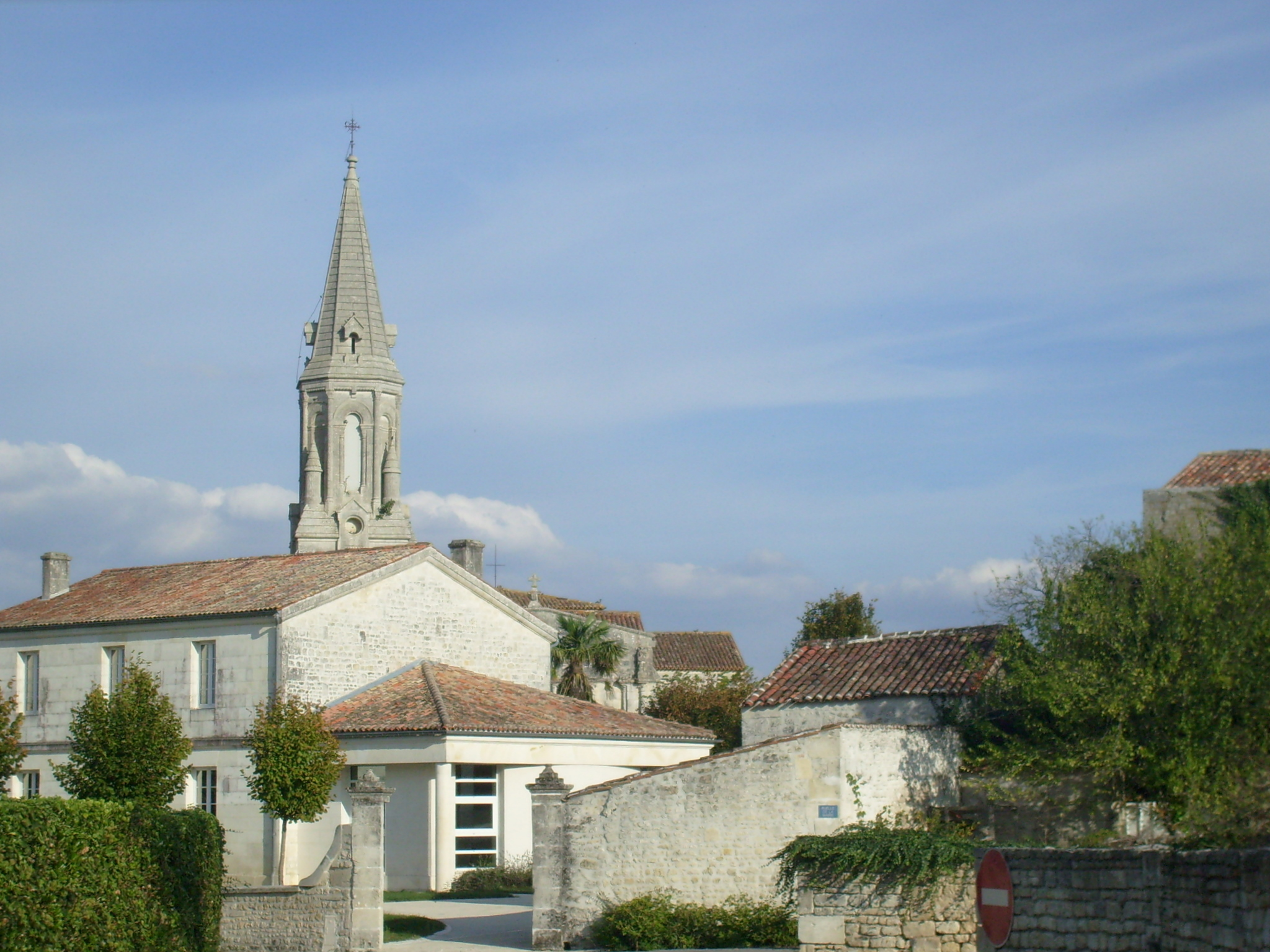 Le village de Tesson, en Charente-Maritime